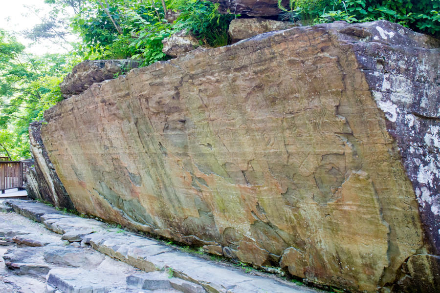 울주 천전리 각석